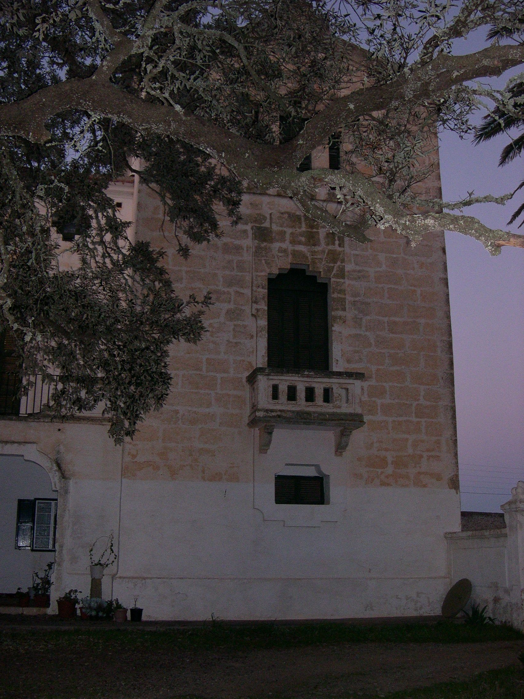 Llumena Nou